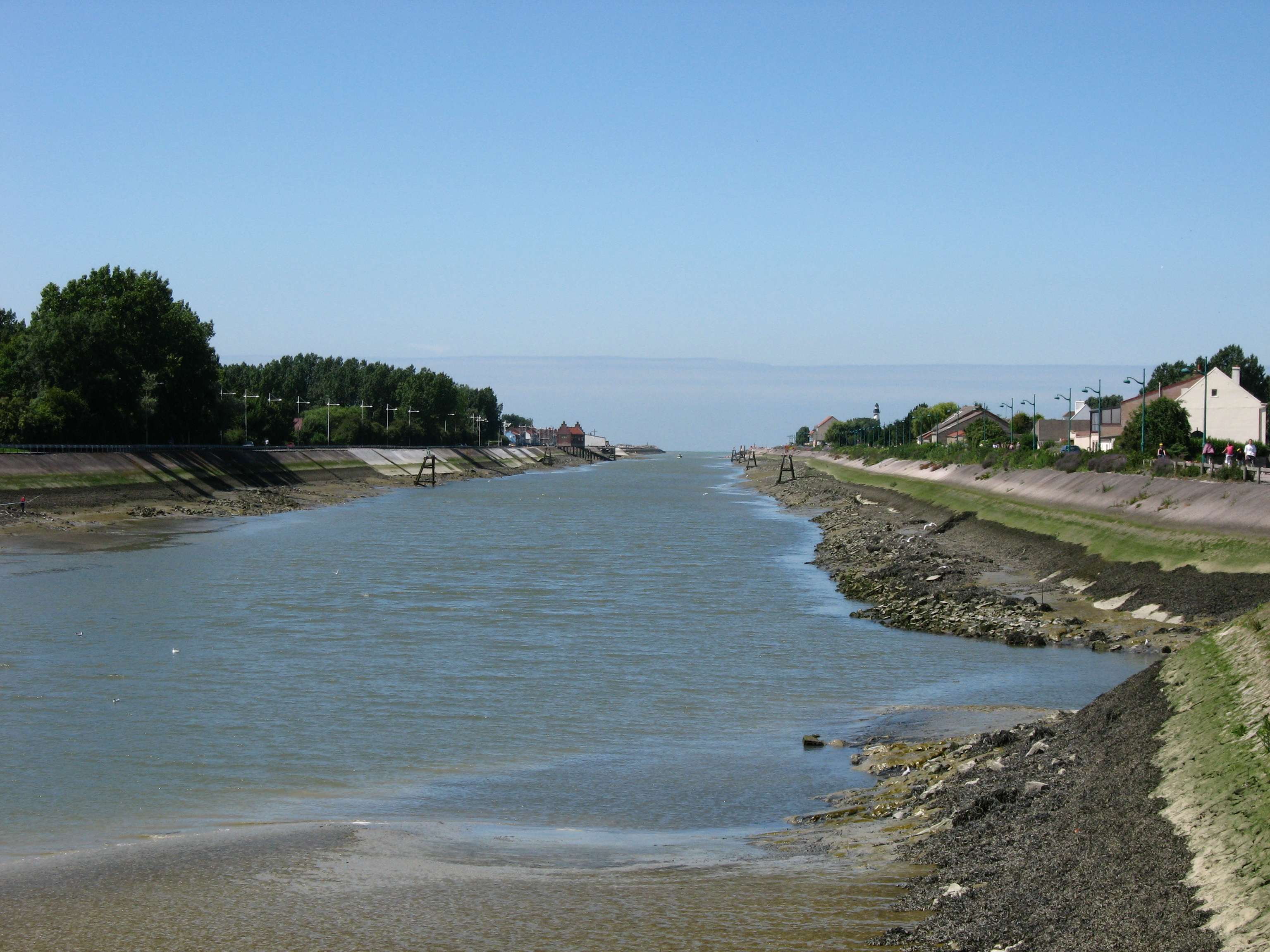 Chenal de Gravelines (l'Aa).